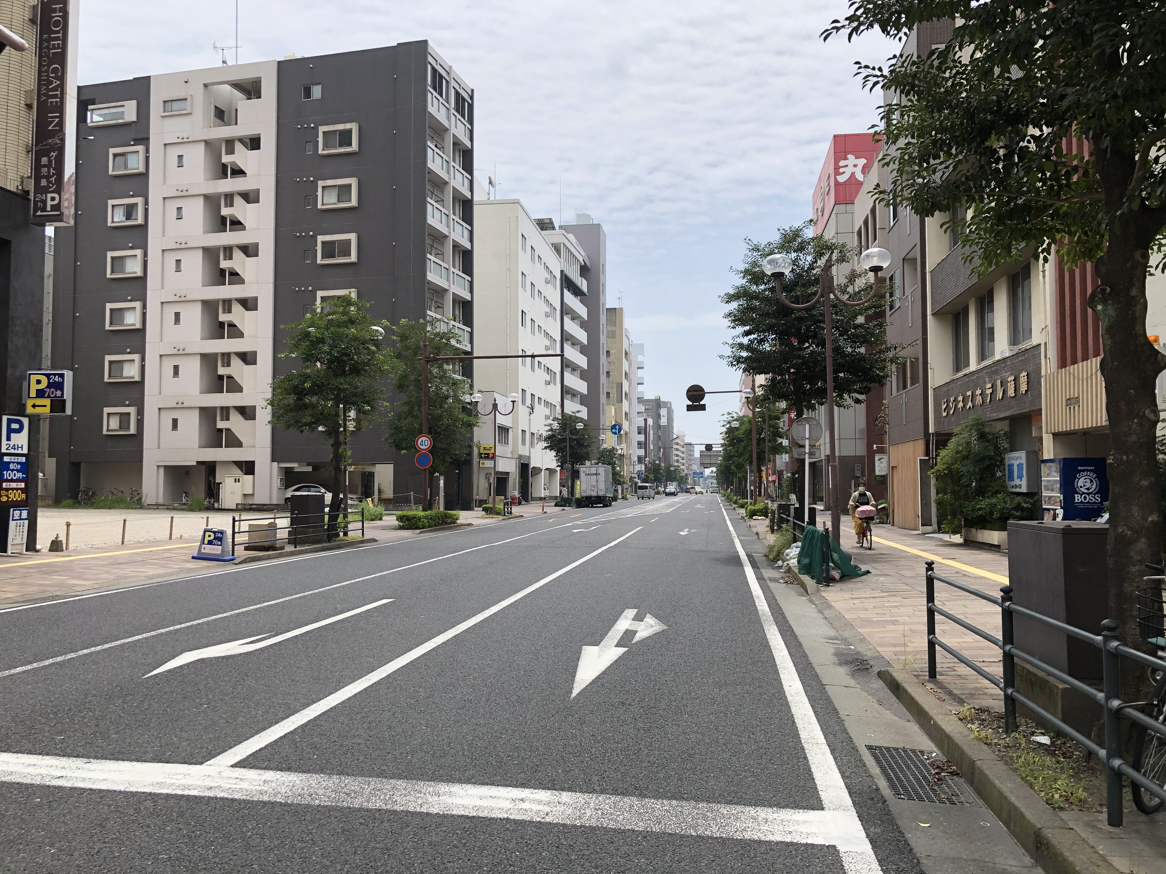 鹿児島市船津町の国道225号を指宿方面に望む